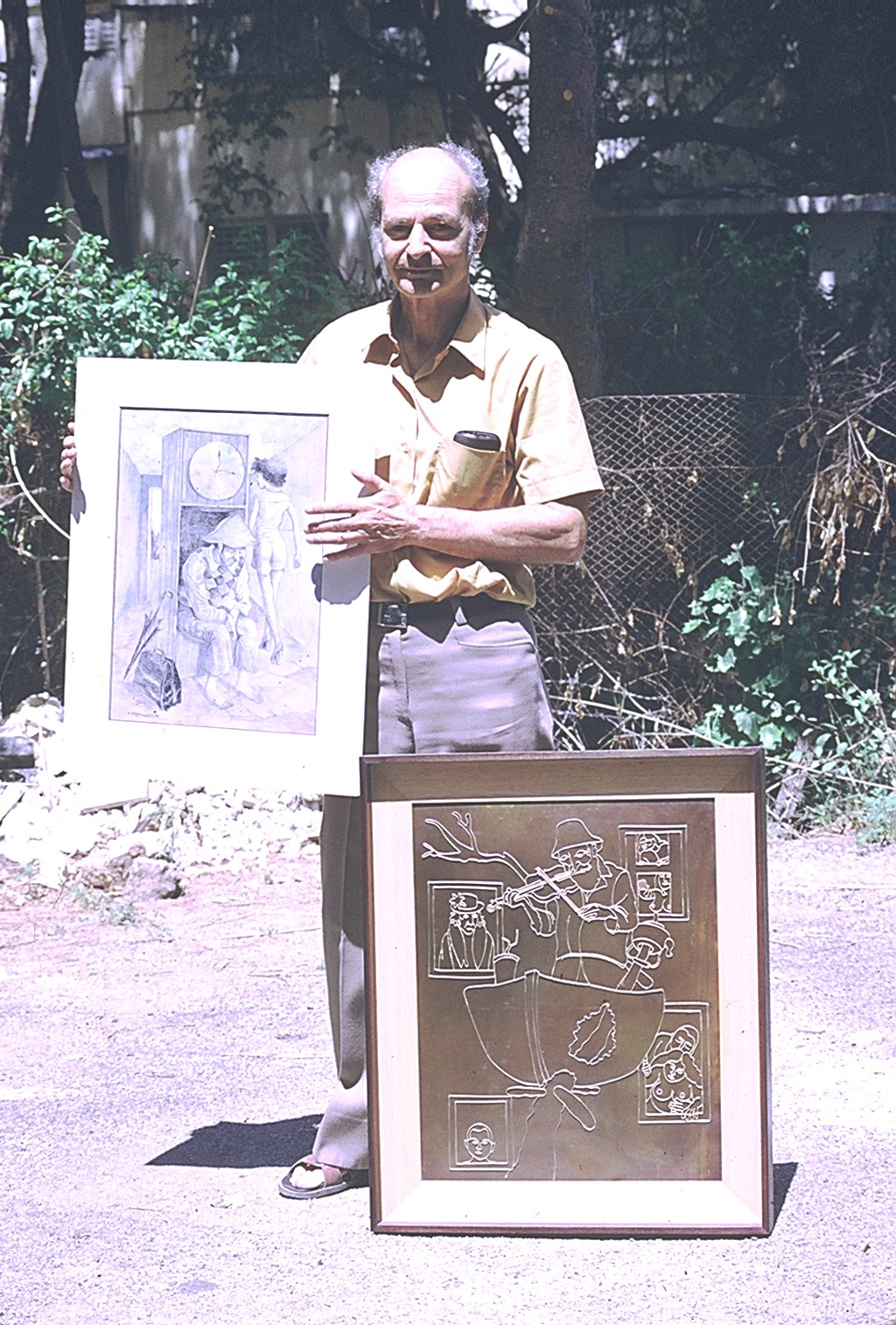 אנטול גורביץ' לצד יצירותיו